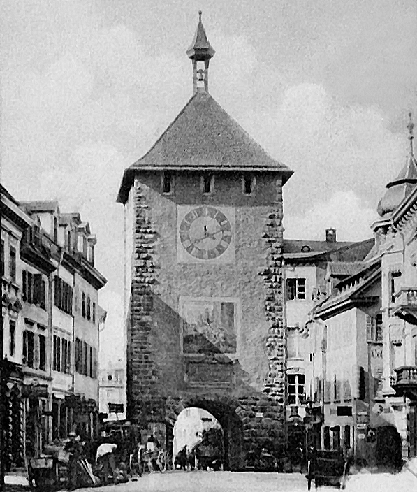 Martinstor, Ansichtskarte